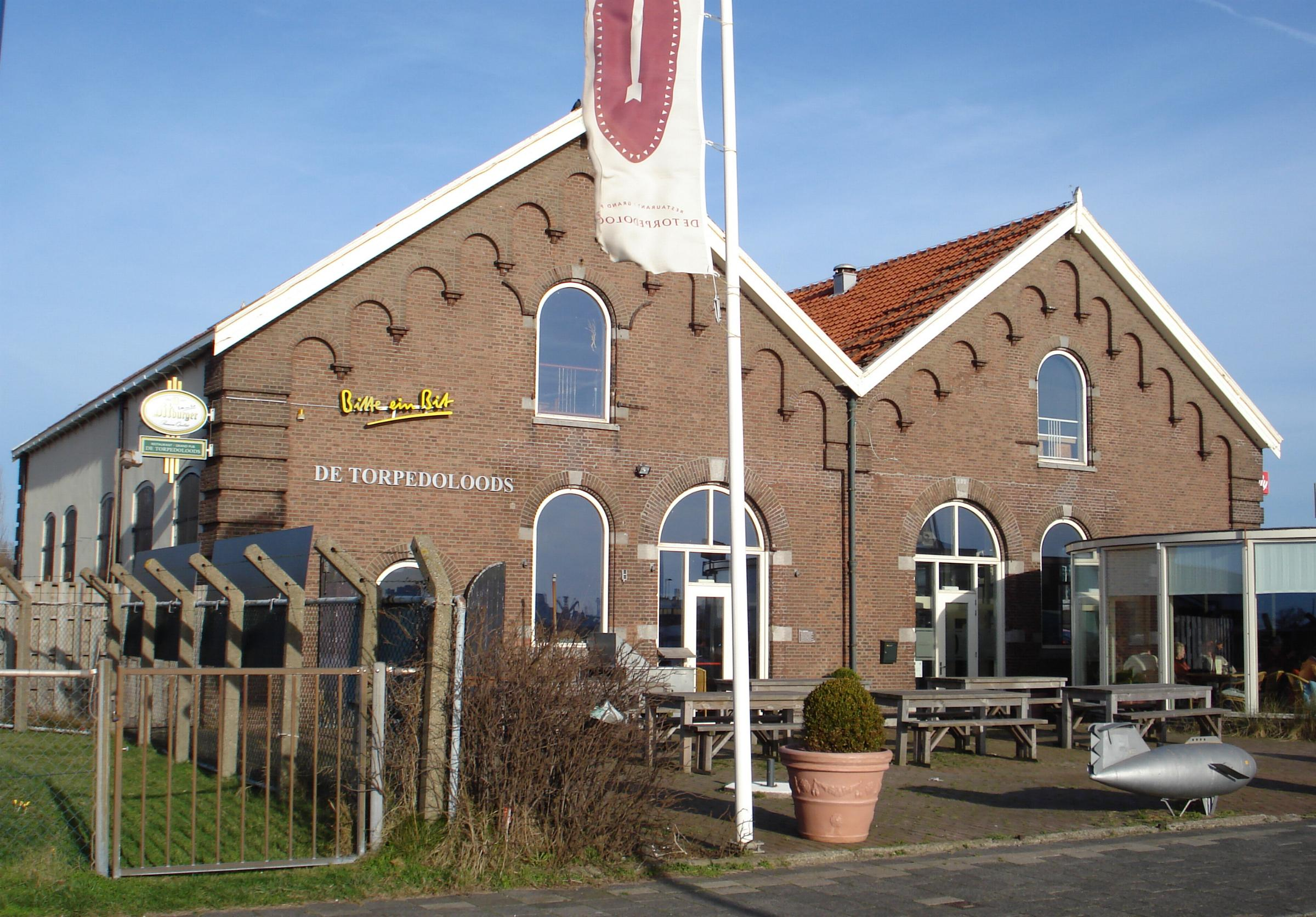 Hoek van Holland, militaire torpedoloods bij fort. Rijksmonument.